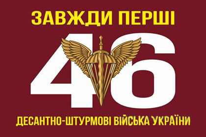 Прапор 46 ДШБр